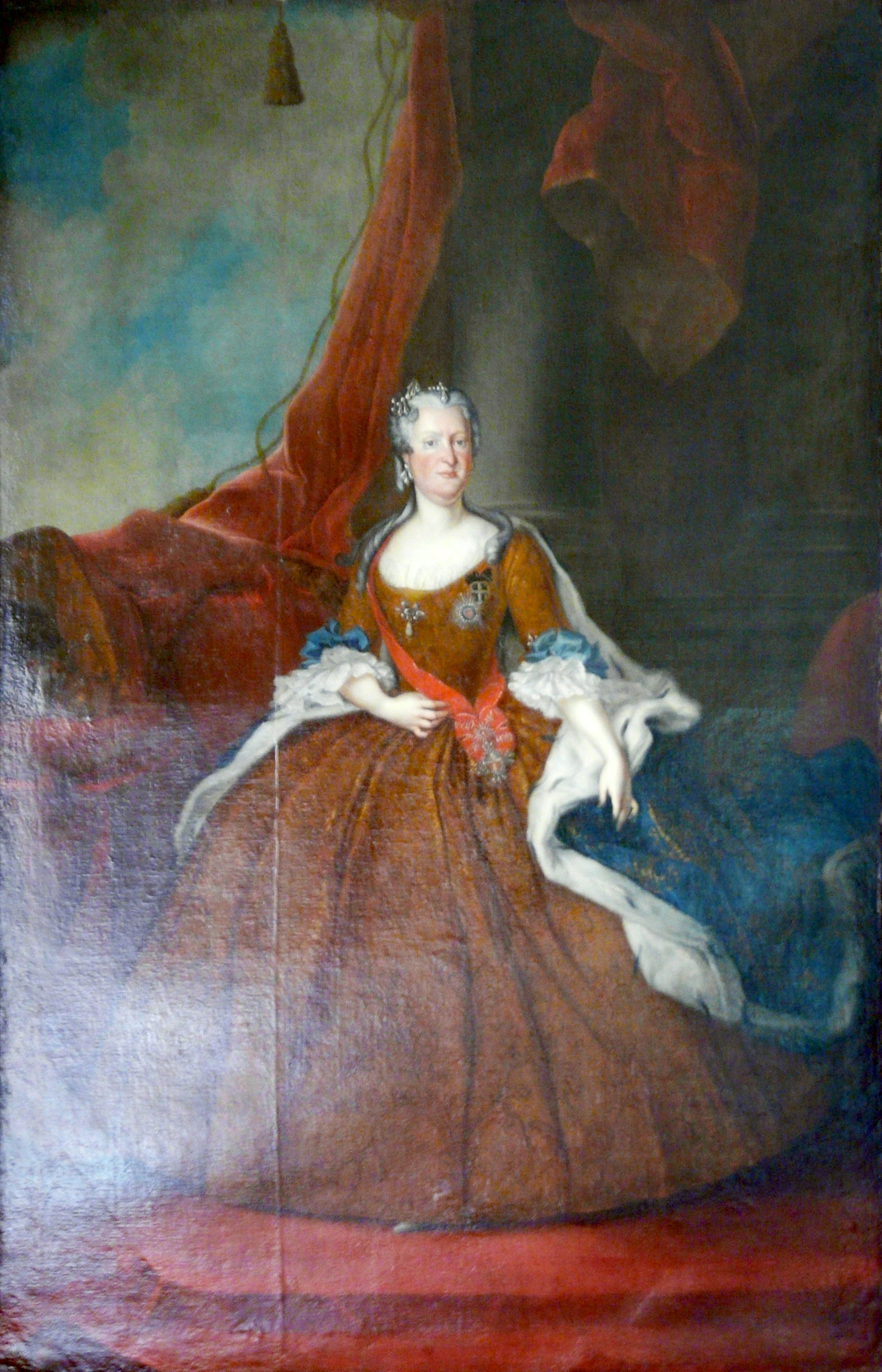 Maria Józefa